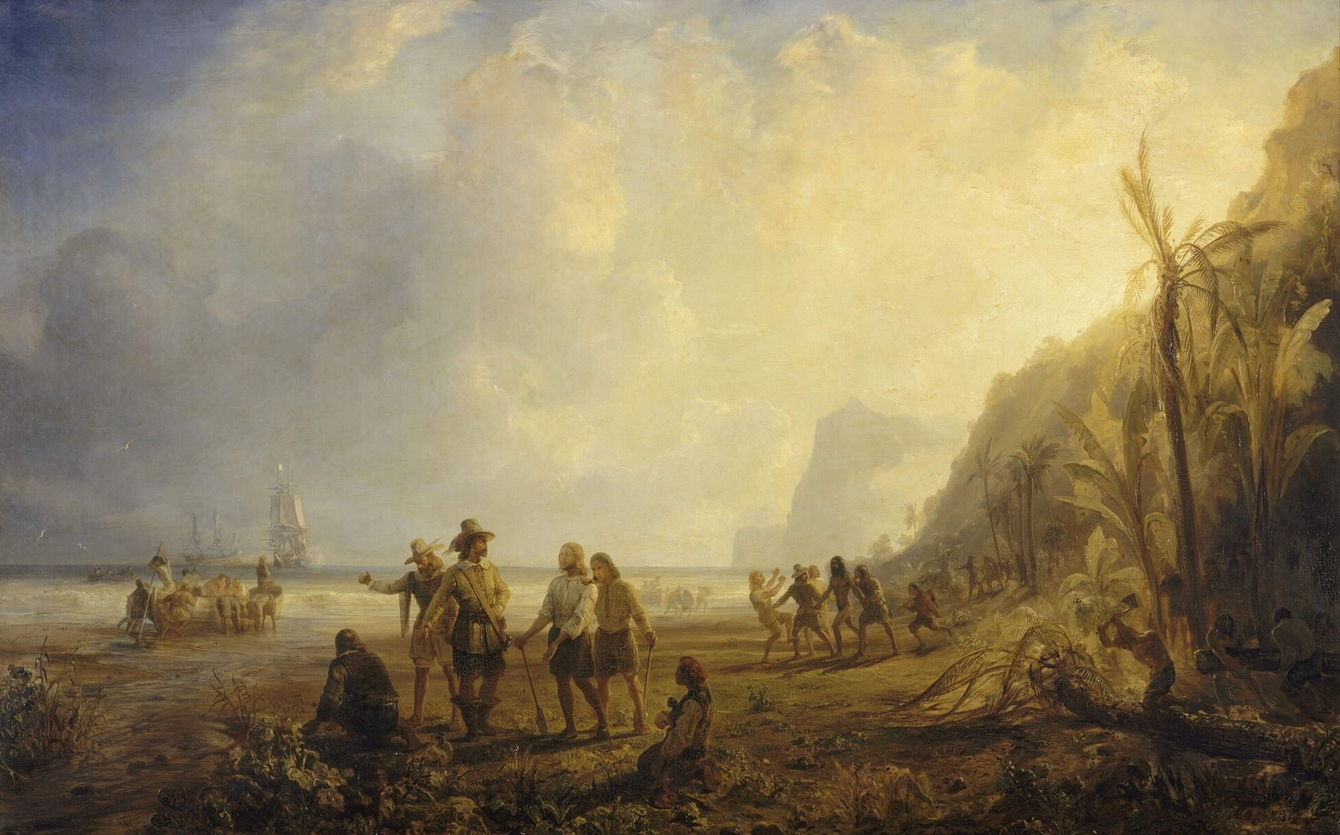 La fondation de la colonie de la Martinique par les Français en 1635 (Pierre Belain d'Esnambuc). Dimensions : 142,7 x 227,8 cm. Cadre : 147,7 x 232,3 x 5,6 cm. Matière et technique : huile sur toile.